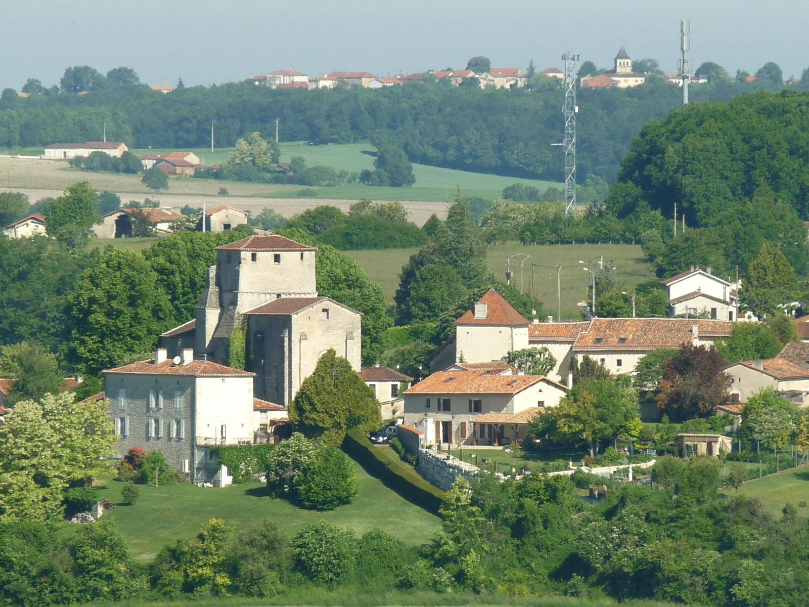 vue sur St-Amant (Charente, France) depuis l'abbaye de Maumont; l'église de St-Eutrope au loin